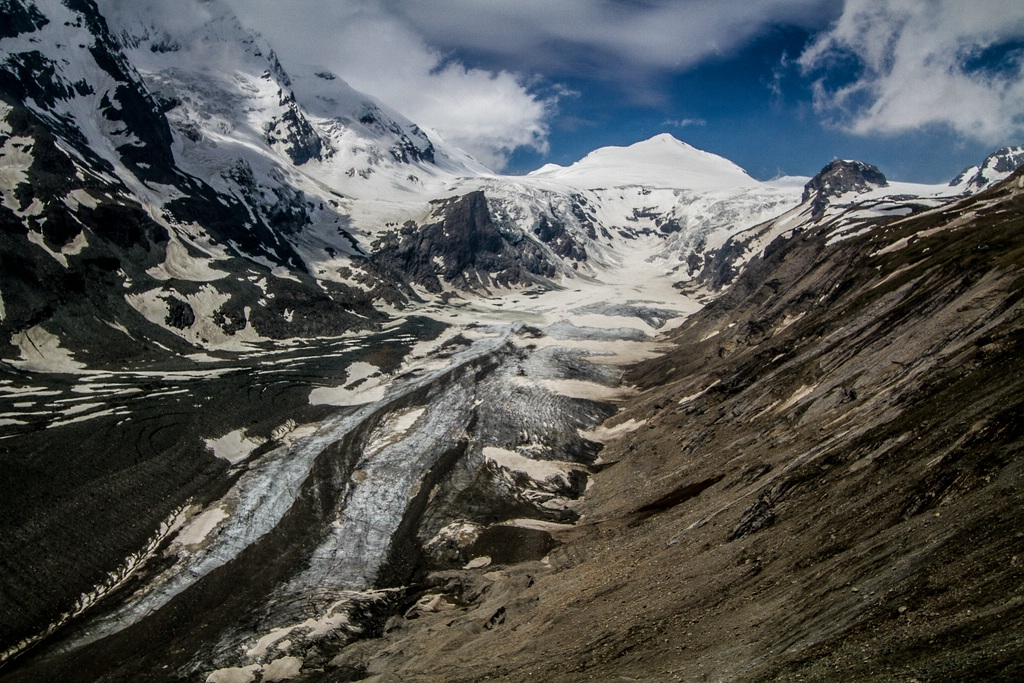 Pasterze